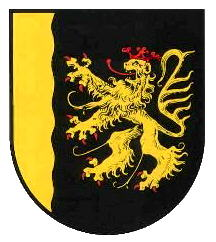 Wappen des Bezirksverbandes Pfalz